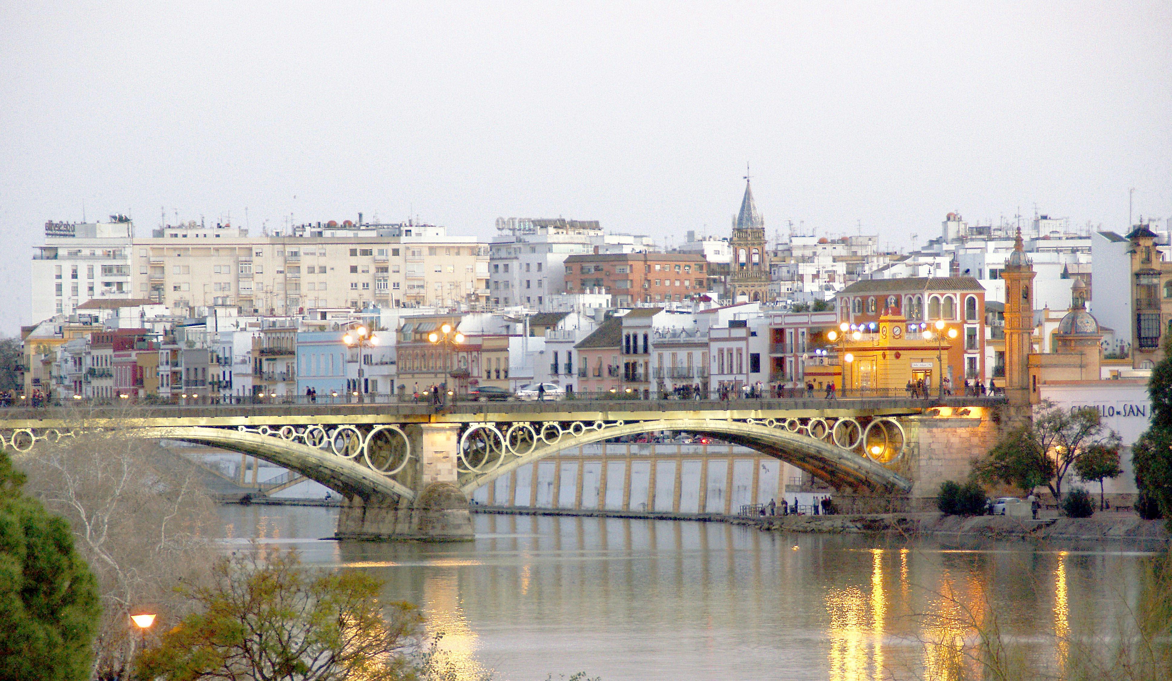 Puente de Triana